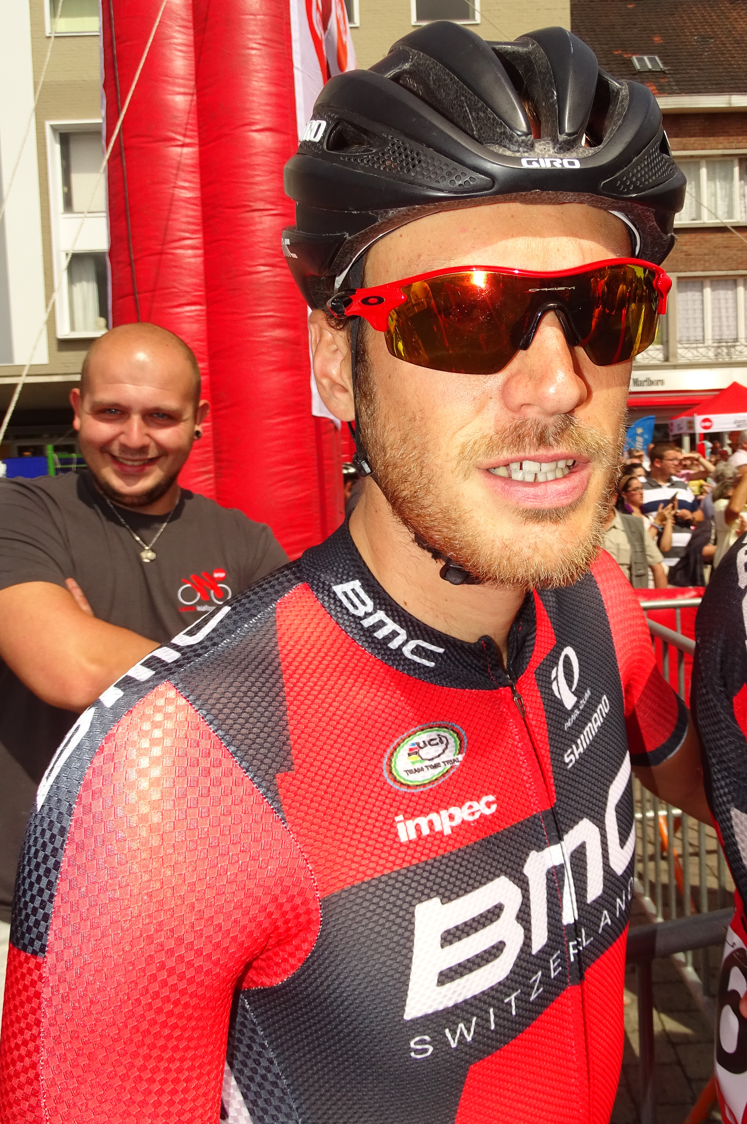 Reportage réalisé le mercredi 22 juillet à l'occasion du départ du Grand Prix Pino Cerami 2015 à Saint-Ghislain, Belgique.